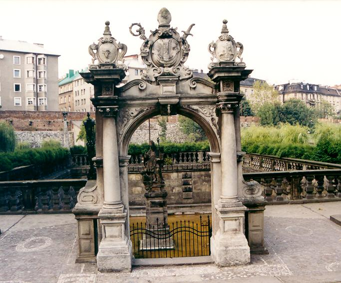 Sadzawka św. Stanisława